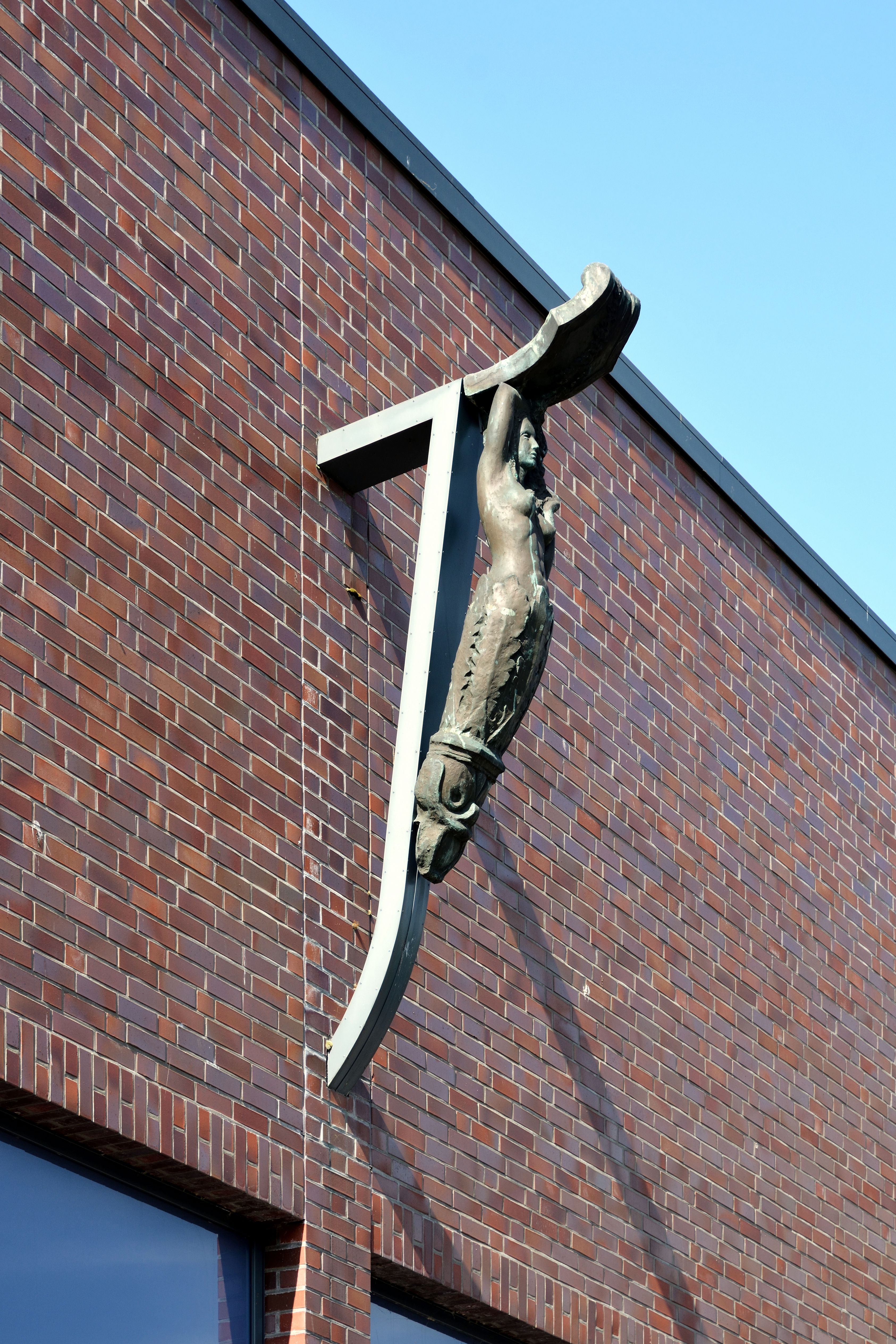 Dieses Kunstwerk war ursprünglich an einem dreieckigen Betonklotz montiert, der den Bug des Walfängerschiffes "Flora" aus Elmshorn darstellte. Der "Flora-Brunnen" stand gegenüber dem Bahnhof.Weblink